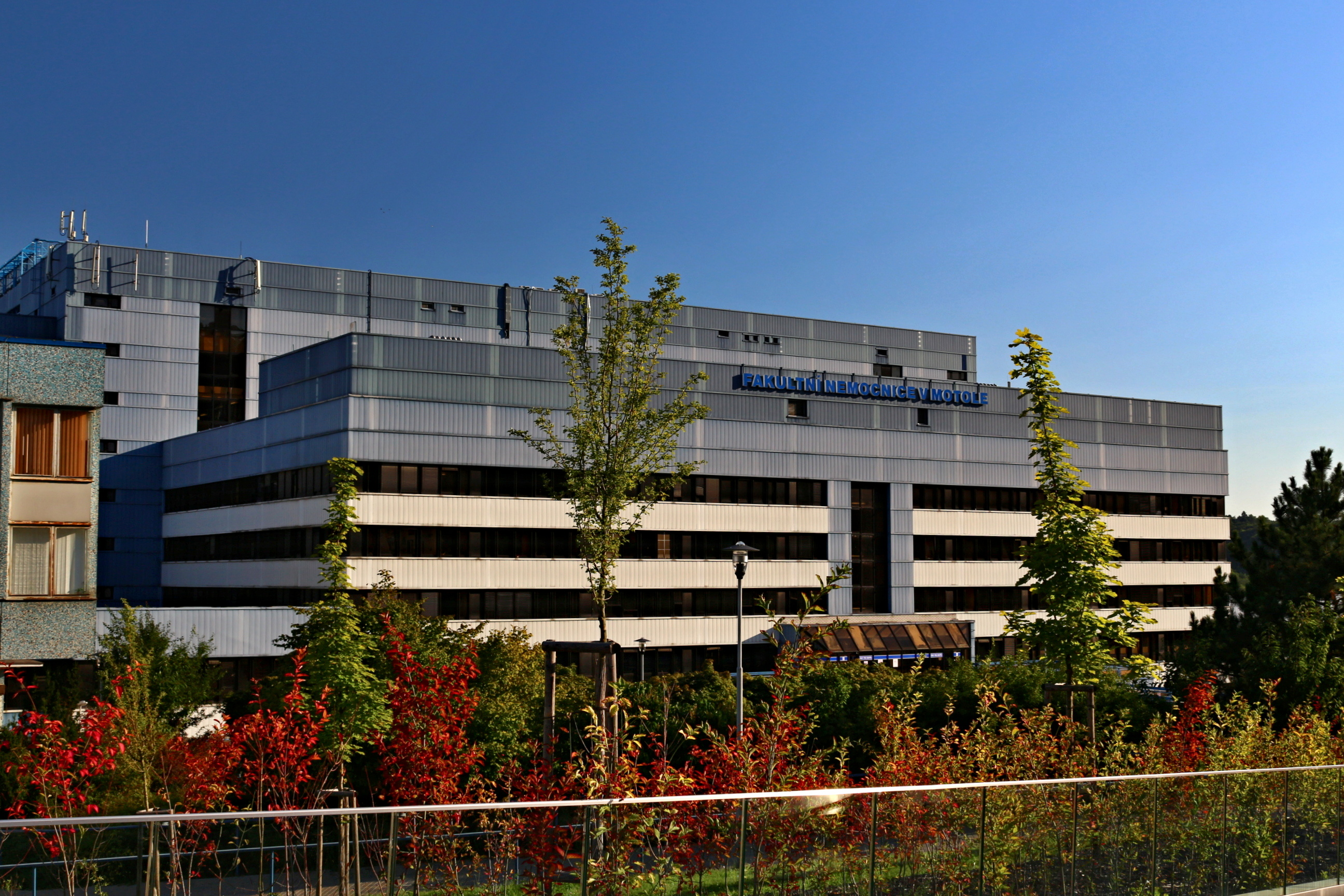 Nemocnice Motol